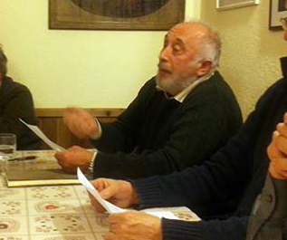 Arpetan: Josèf Harriet pendent una tâbla en 2014.